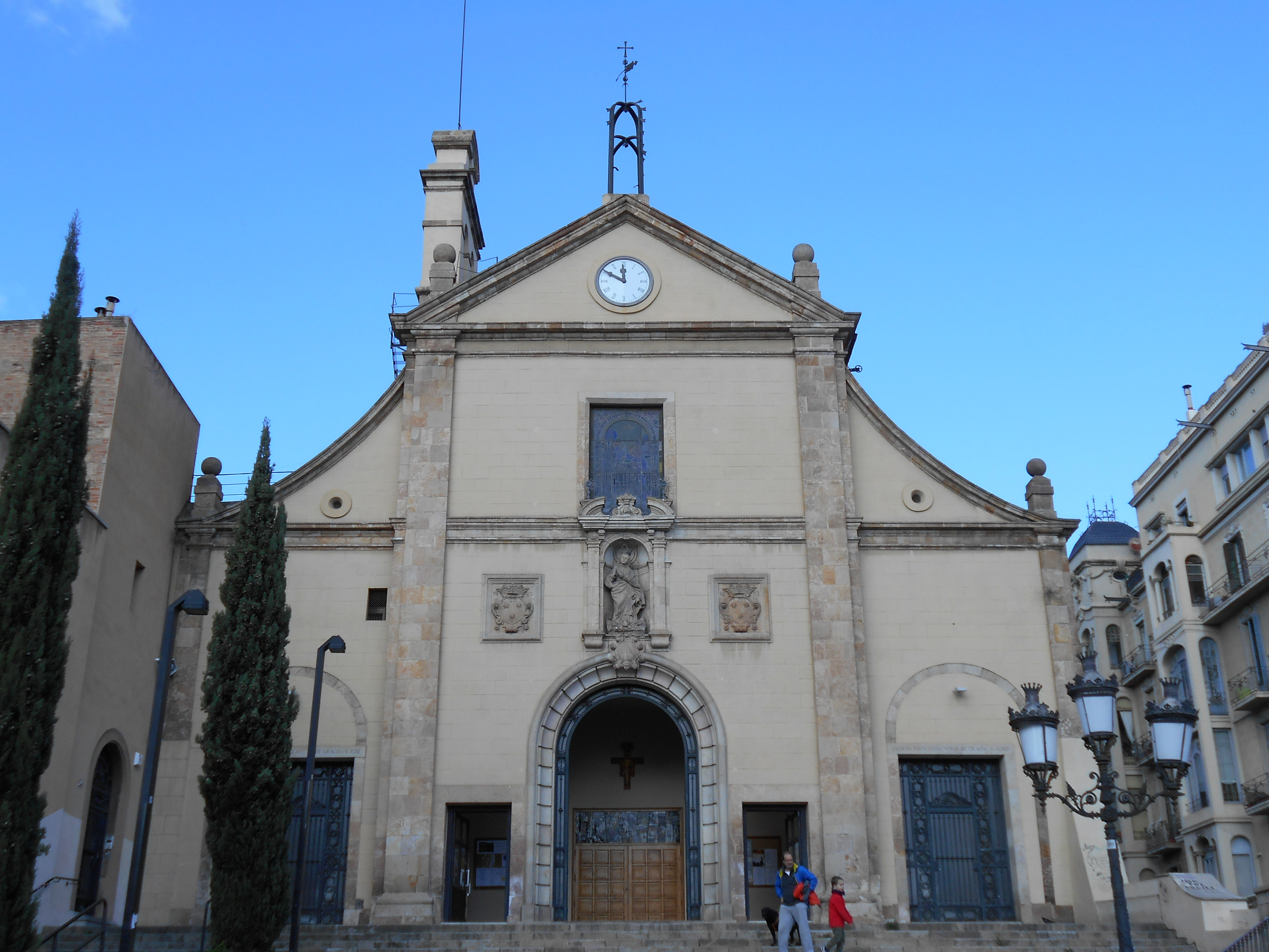 Iglesia de los carmelitas descalzos de Nuestra Señora de Gracia y San José —apodada dels Josepets—, en la plaza Lesseps, Barcelona, obra de Fray Josep de la Concepció (1687).